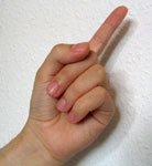 Chinesische Zahl Eins